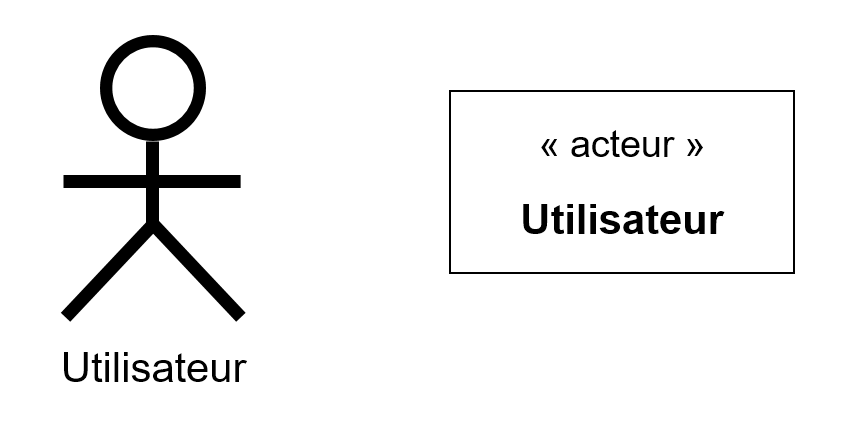 Deux représentations graphiques équivalentes d'un acteur en UML. La représentation de gauche utilise un bonhomme allumette tandis que la représentation de droite est une classe avec un stéréotype.